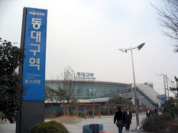 철도 동대구역.